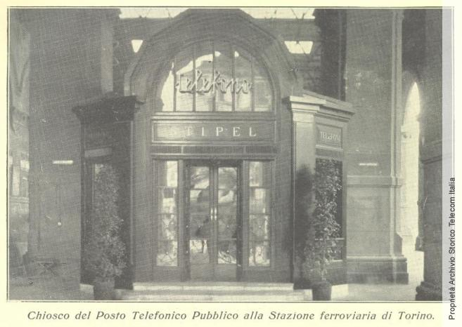 chiosco telefonico STIPEL alla stazione ferroviaria di Torino